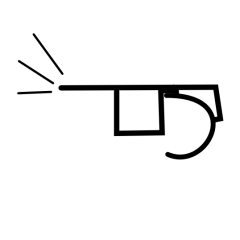 Esquisse ultra-minimaliste de Richard.